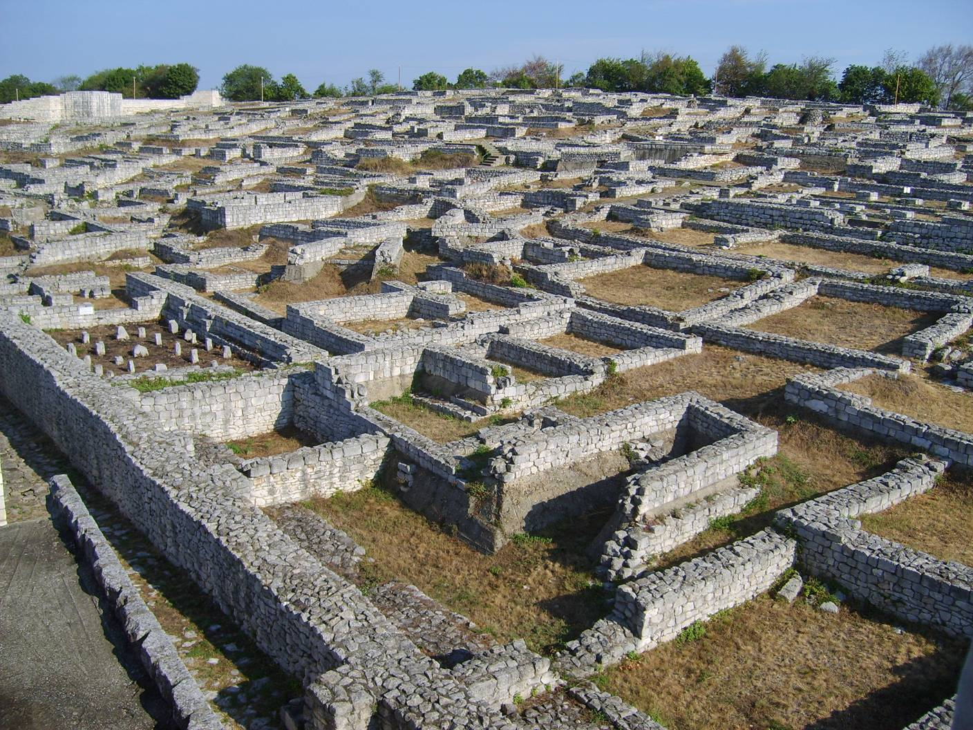 Изглед от Шуменската крепост